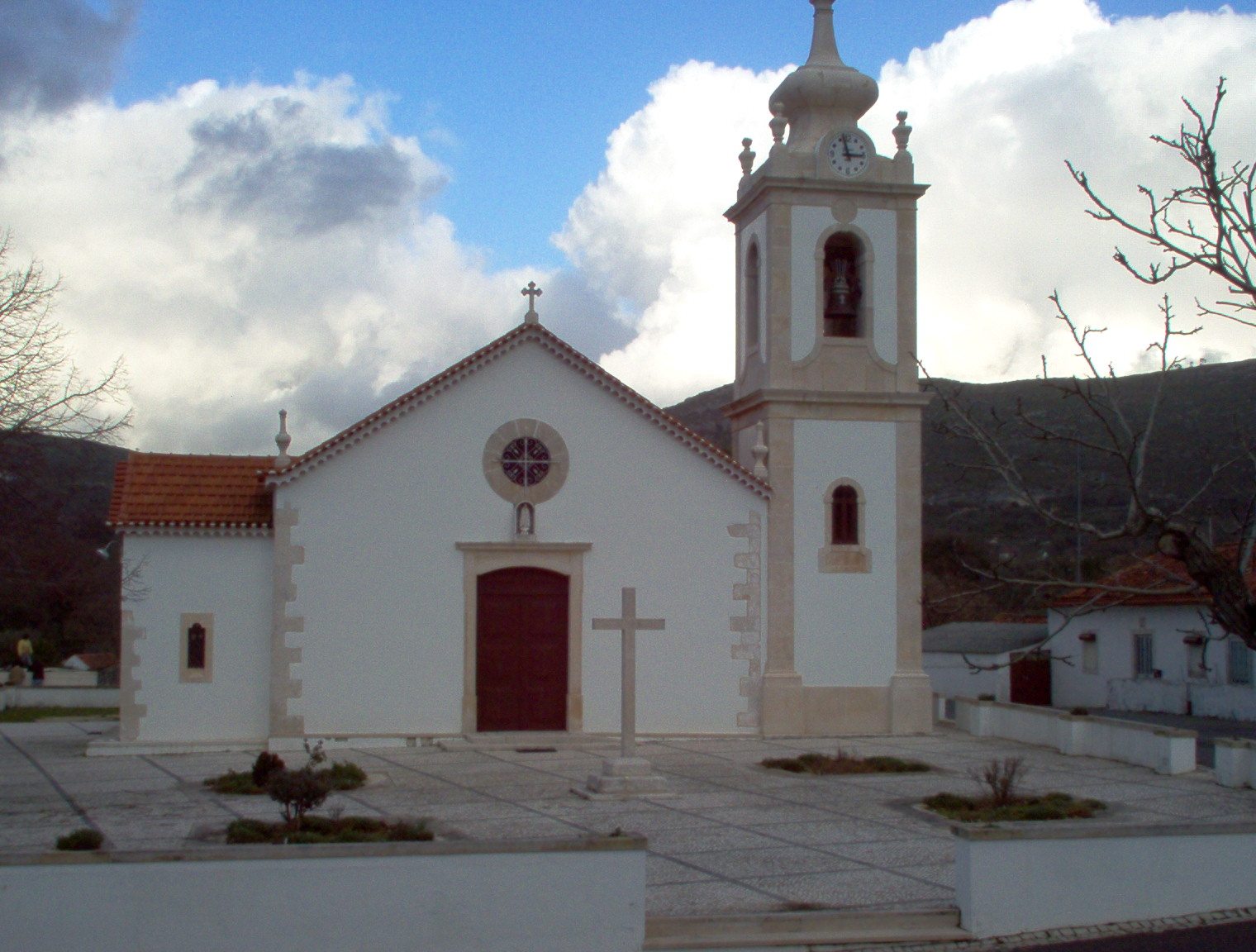 Igreja de Nossa Senhora da Consolação, 2009, Alvados This file was uploaded for Wiki Loves Monuments in Portugal with the unique identifier 97010098.